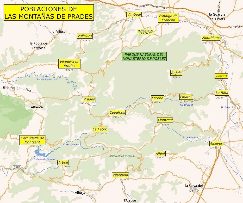 Localidades de las montañas de Prades a partir de Wikimedia maps